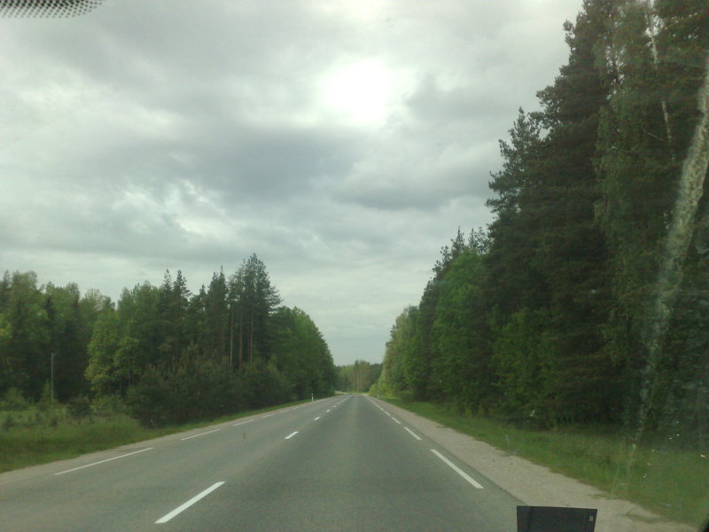 P97 near Gardene, Latvia